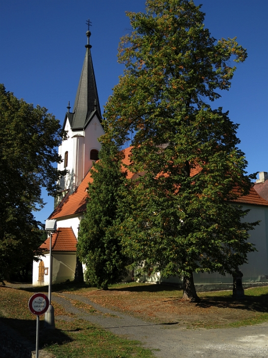 Kostel svatého Jana Křtitele, Janovice nad Úhlavou.